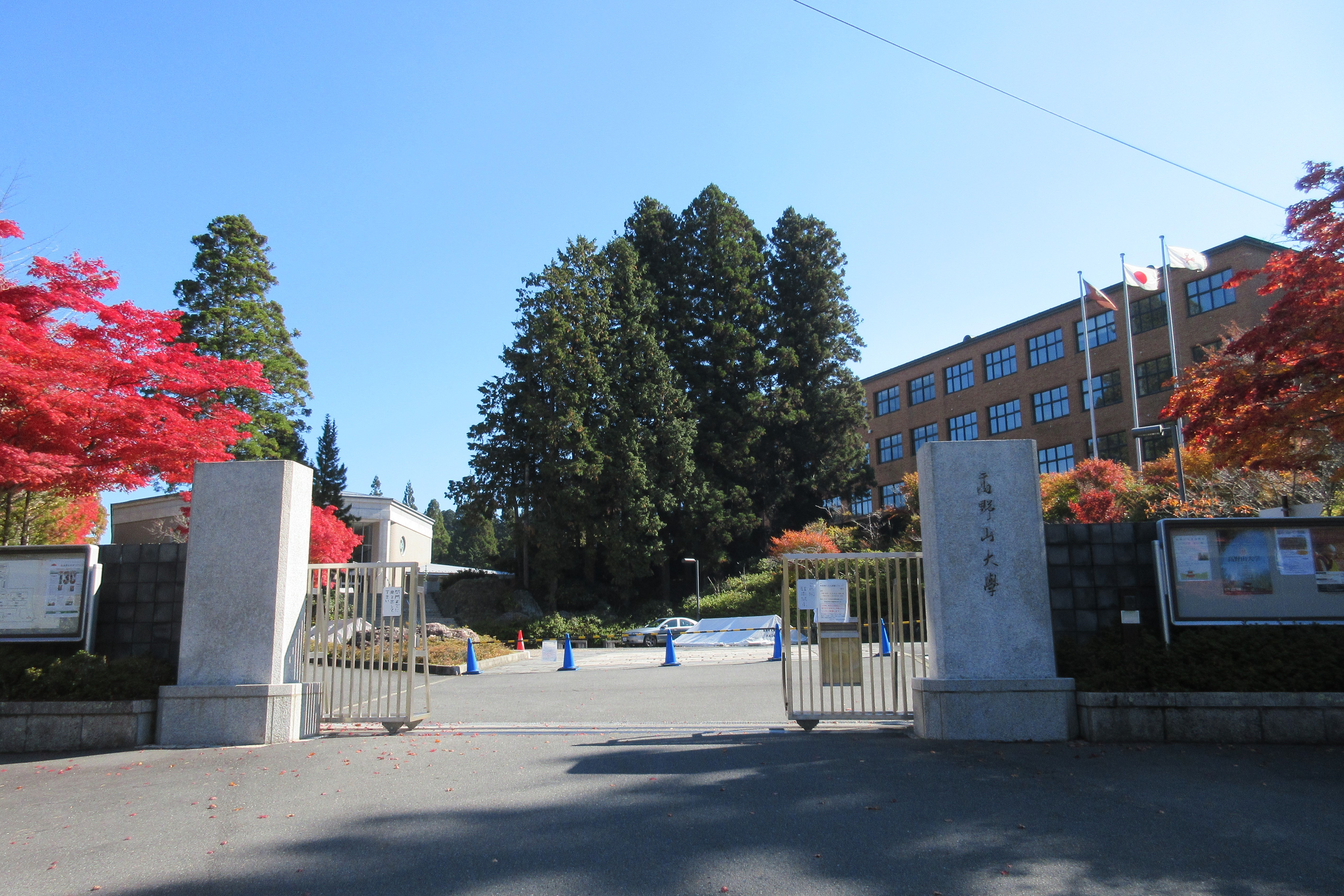 高野山大学正門